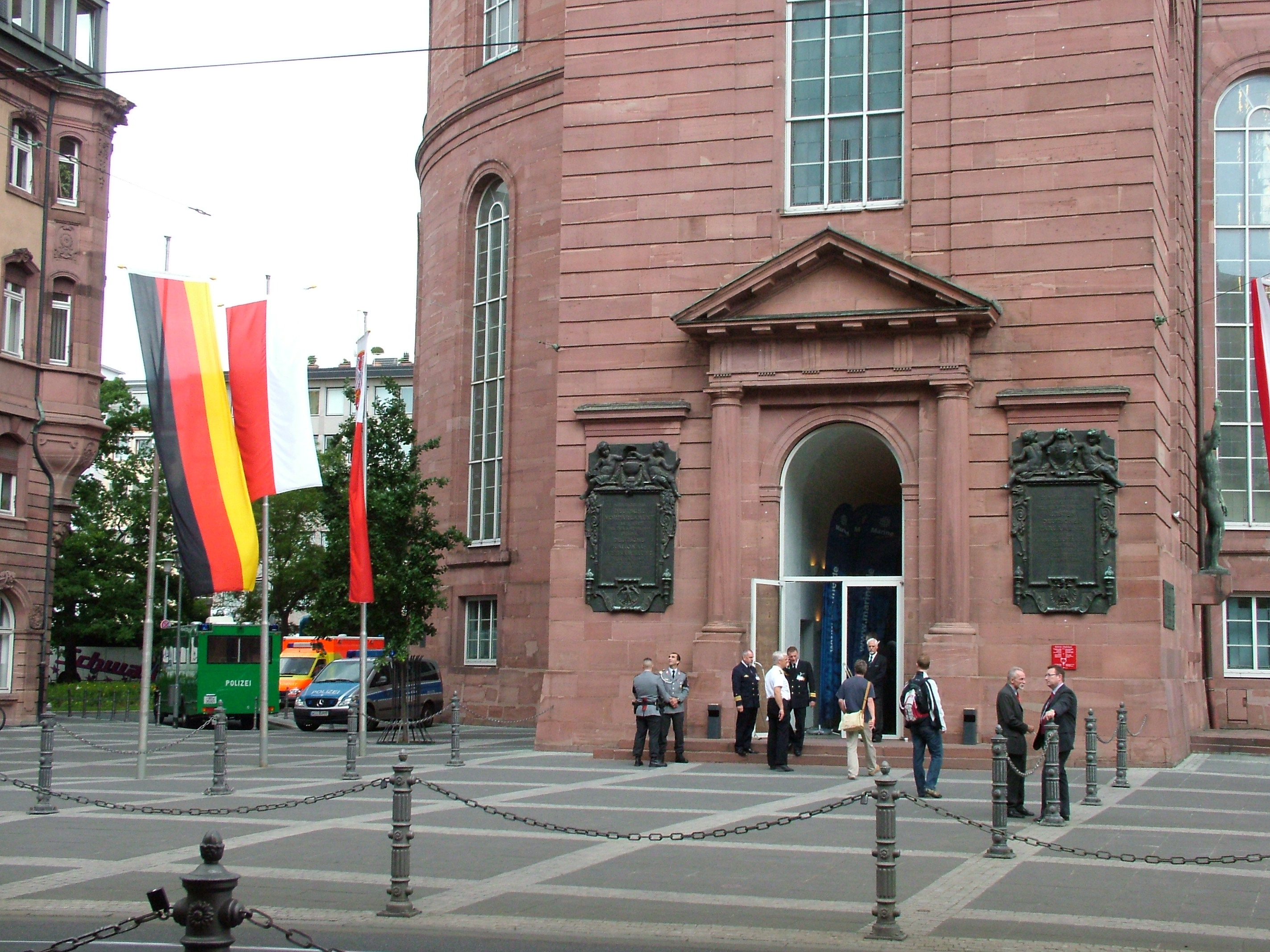 Die Deutsche Marine begeht den 14. Juni als ihren Gründungstag in der Frankfurter Paulskirche (160 Jahre Flottenbeschluss).